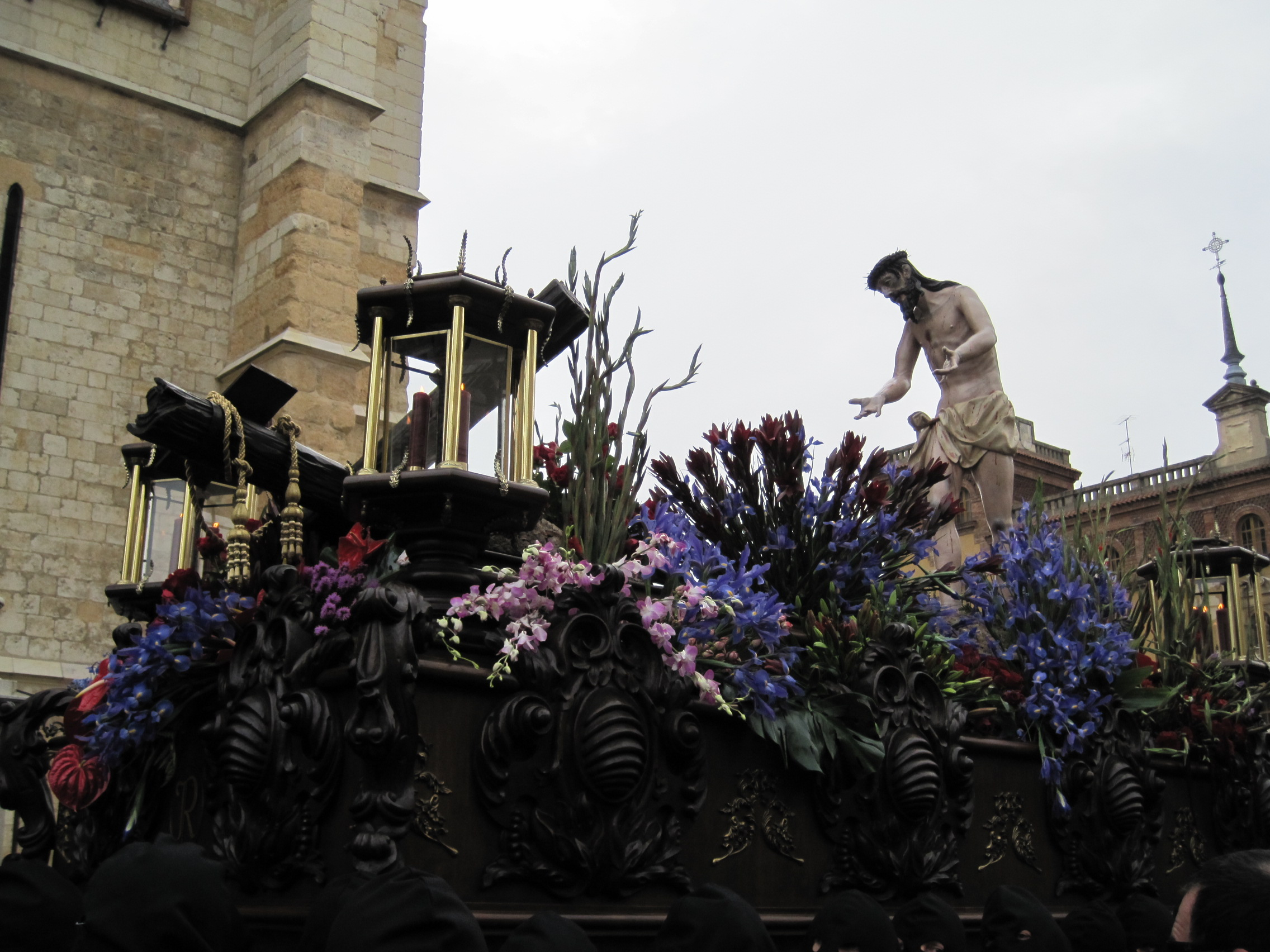 Paso de El Expolio. Procesión de los Pasos. Cofradía del Dulce Nombre de Jesús Nazareno, León (España).